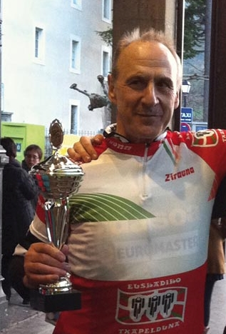 Luziano Mitxelena, Artziniegan (Araba), master 60 kategorian Euskal Herriko txapeldun, 2014ko otsailaren 8an.